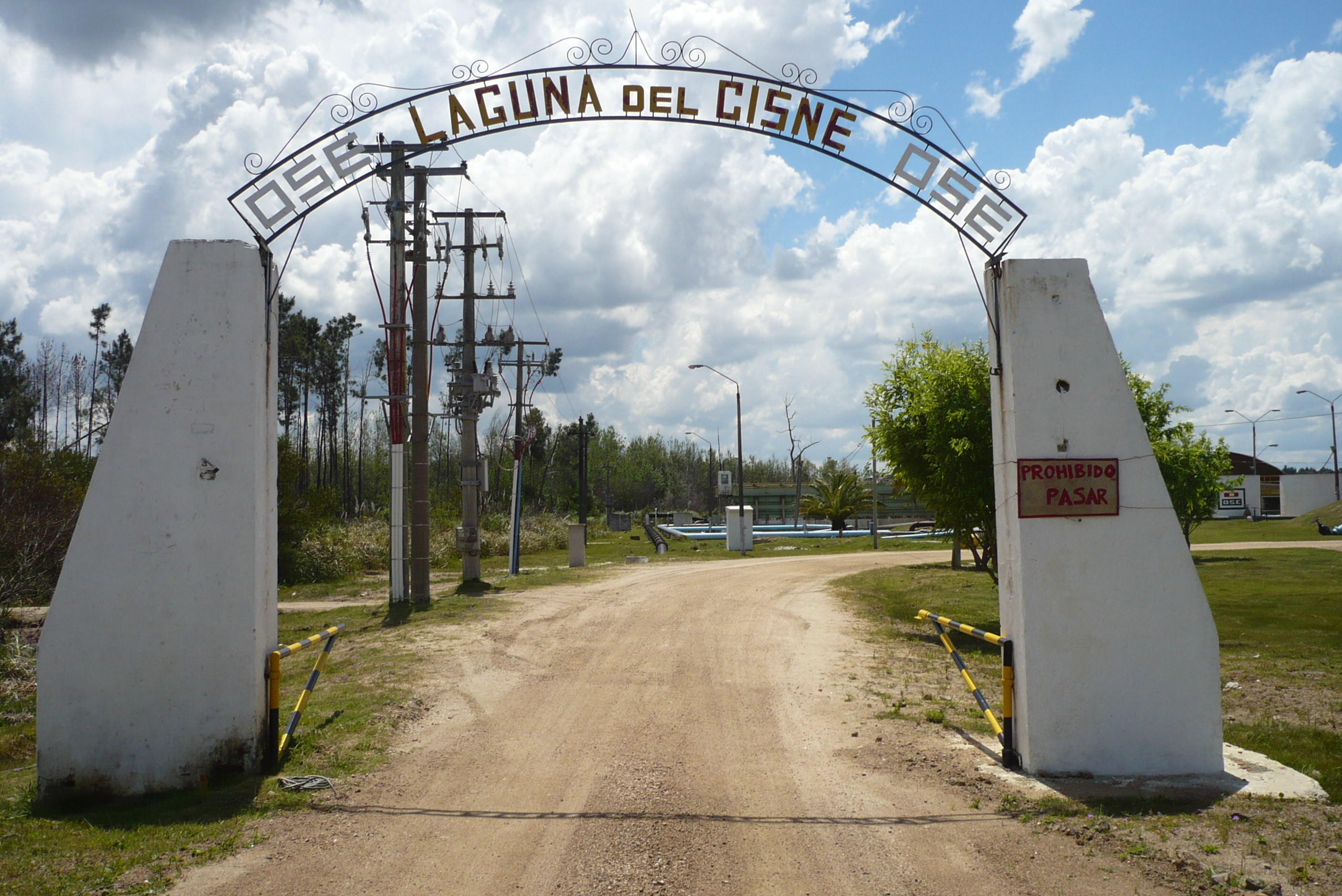 Laguna del Cisne - OSE